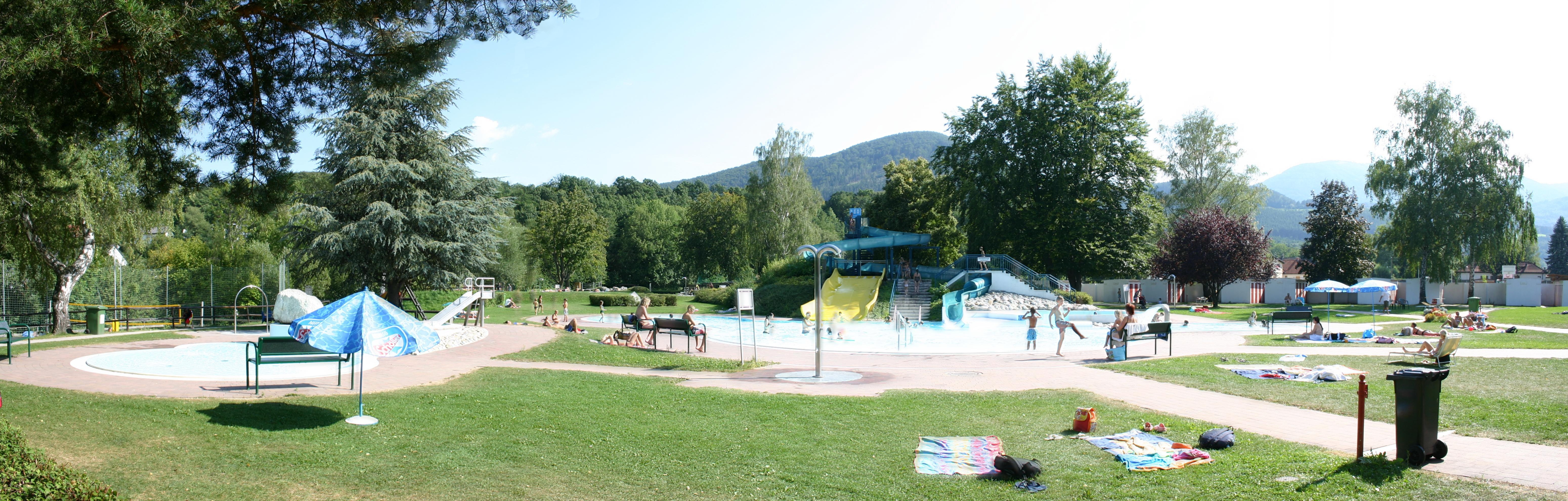 Gloggnitz, Naturbad (Bild 2)